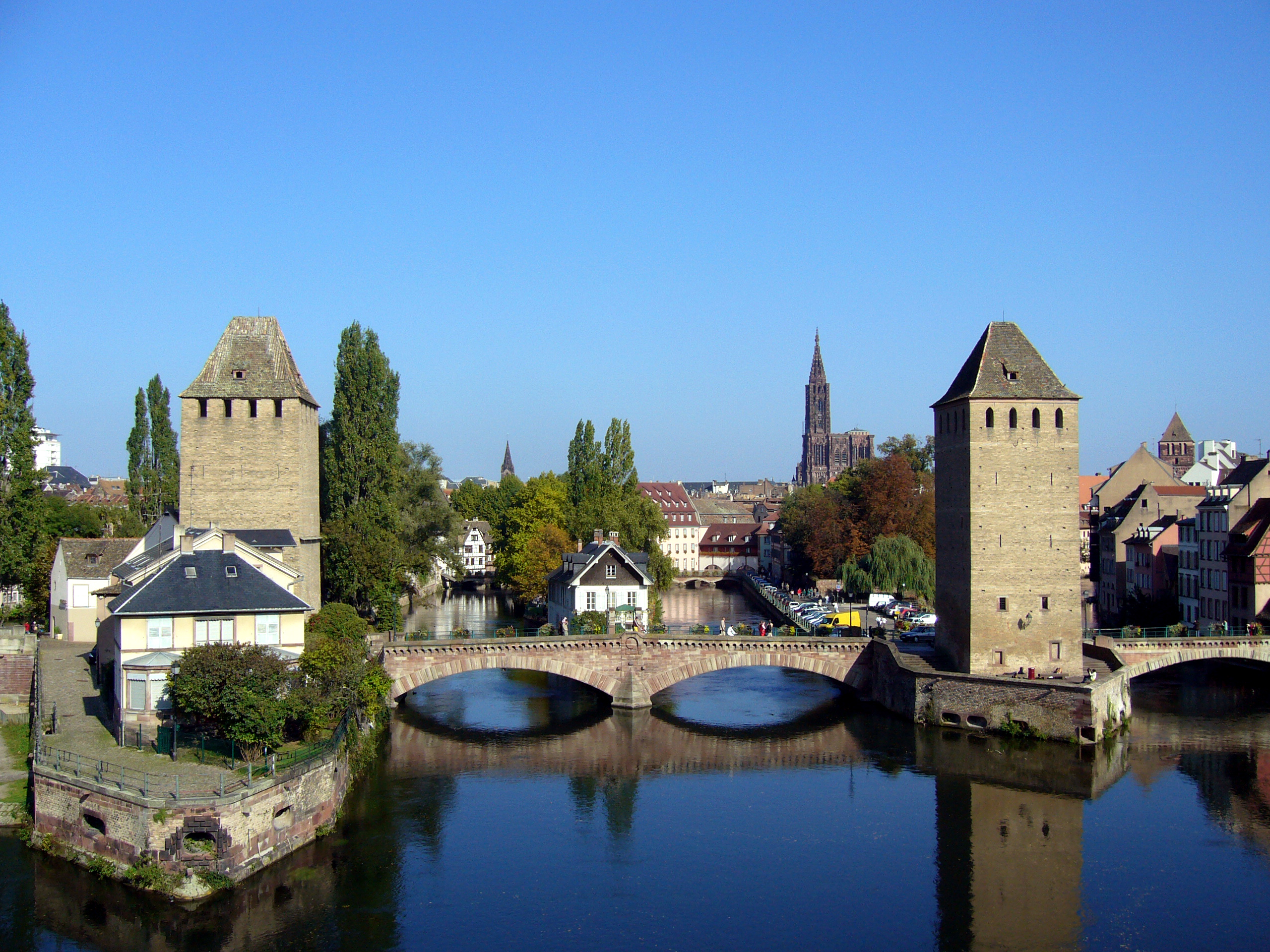 Les ponts couverts